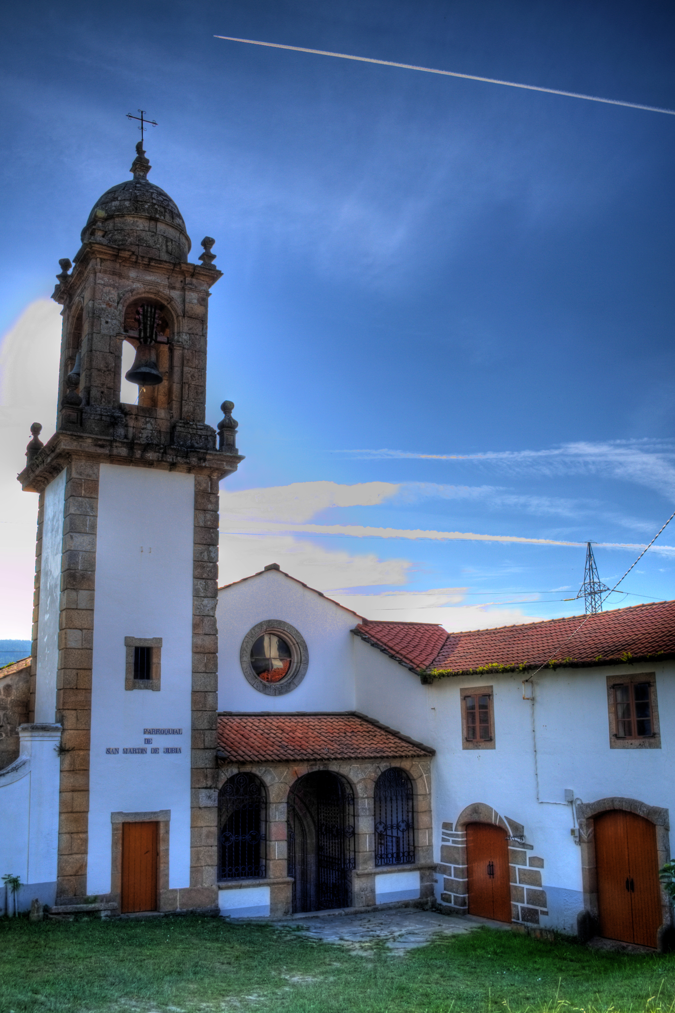 Monasterio de San Martiño de Xubia - Narón (A Coruña)